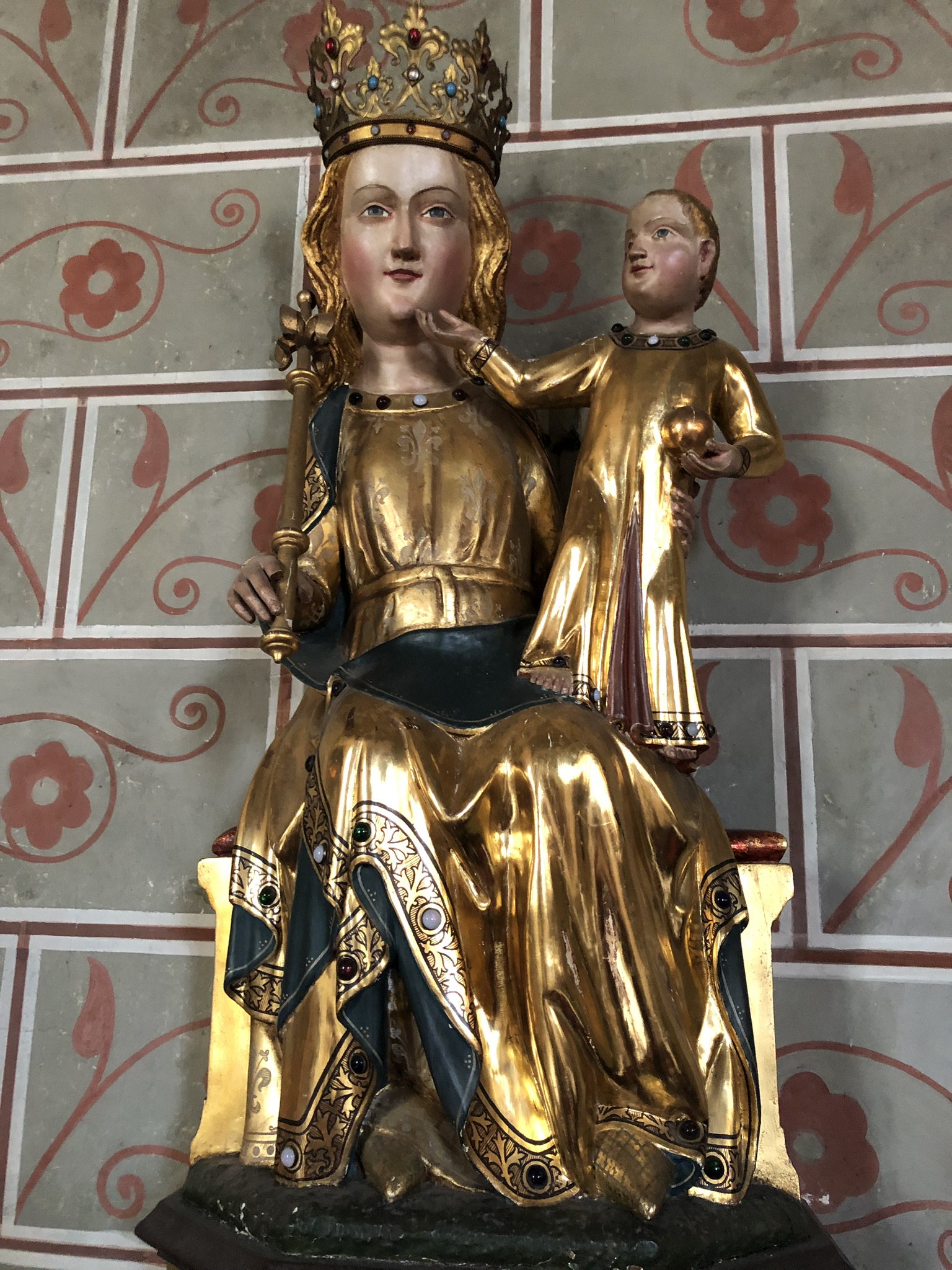 Madonna mit Kind von 1400 aus Mechernich-Floisdorf